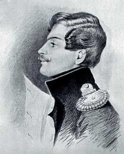 Портрет Жоржа Шарля Дантеса работы Т. Райта. Акварель. 1830-е годы